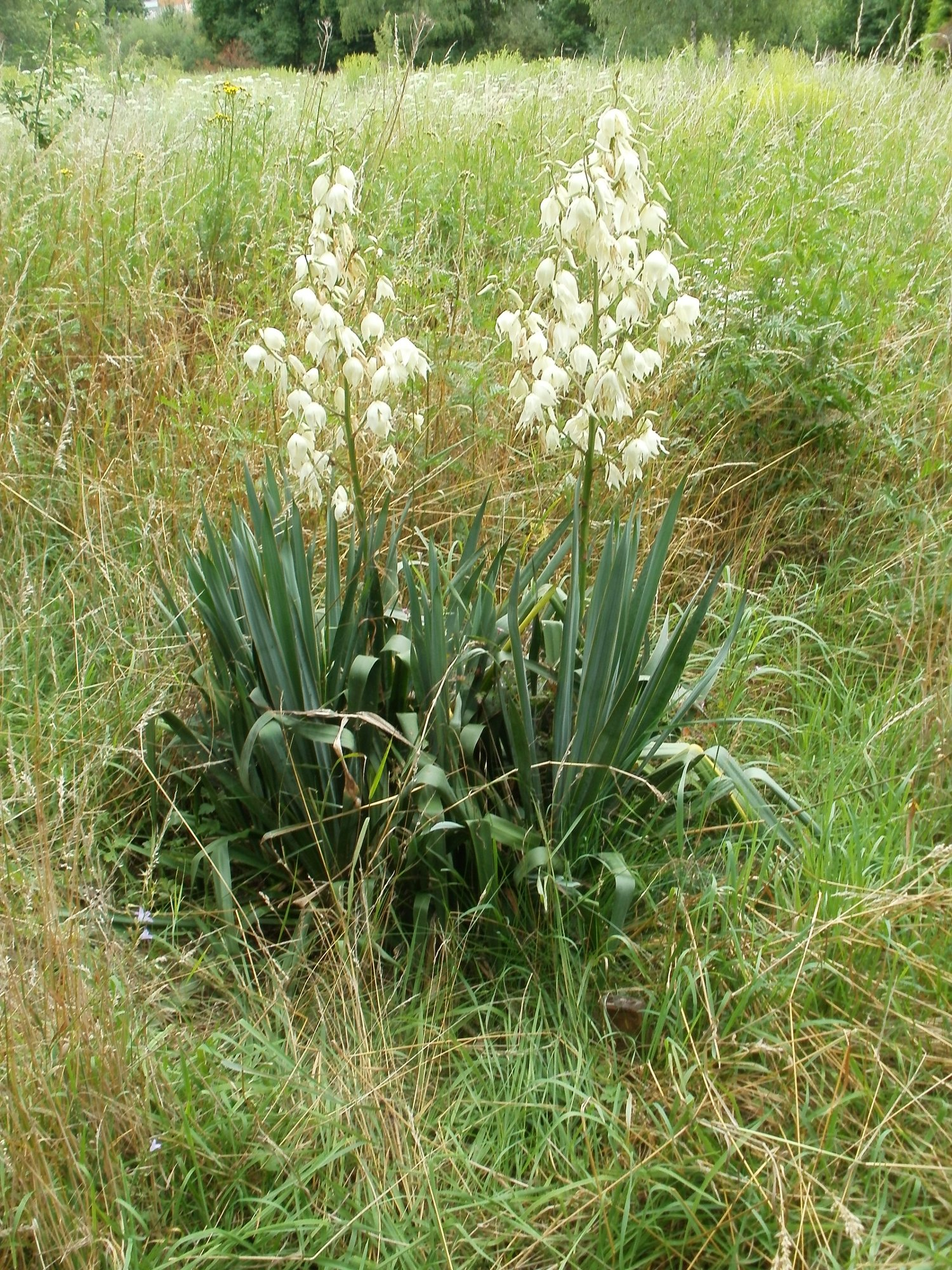 Palmlilie (Yucca gloriosa") am Tierfriedhof Saarbrücken